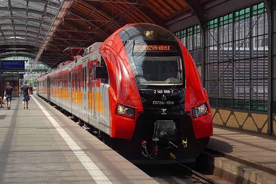 Zmodernizowany elektryczny zespół trakcyjny ED72Ac-101, należący do Przewozów Regionalnych, jako pociąg R64418/9 relacji Wrocław Główny - Kędzierzyn-Koźle.